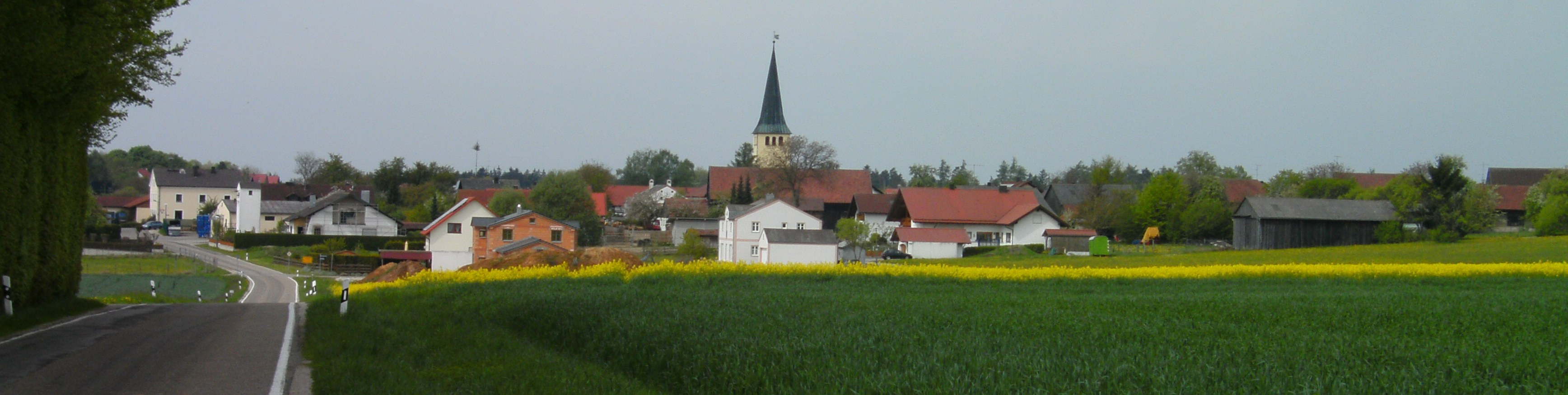 Irlahüll, Gemeindeteil von Kipfenberg im Landkreis Eichstätt, Bayern